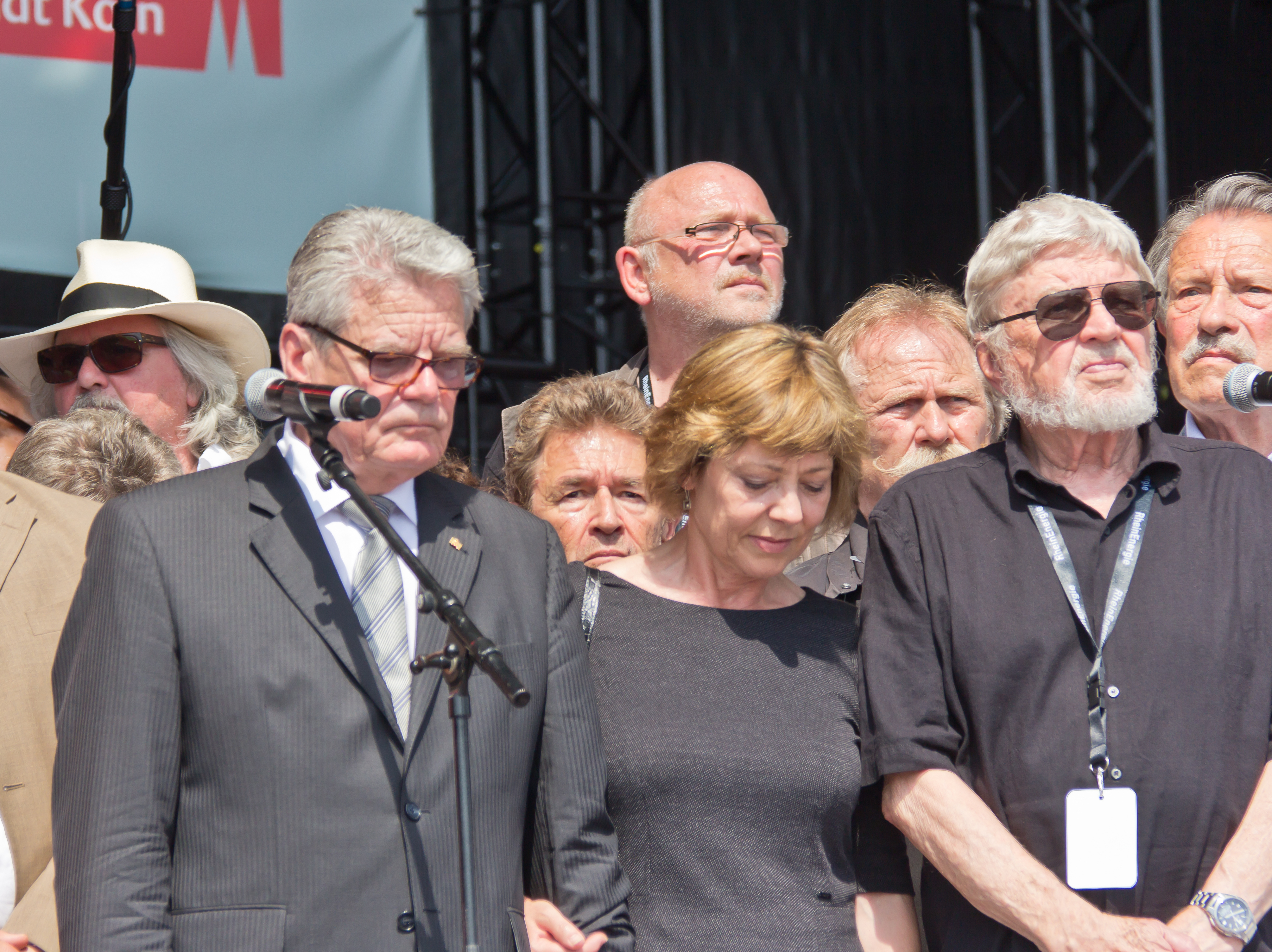 Birlikte - Kundgebung - Schweigeminute